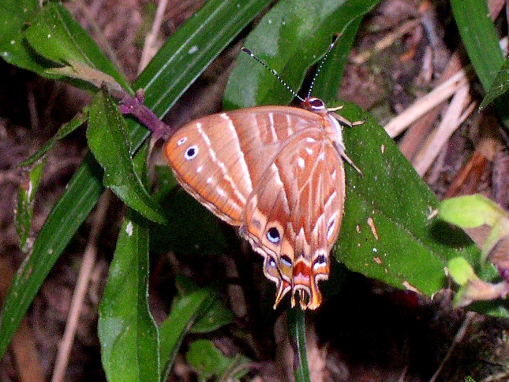 Saribia Tepahi. Riodinidae